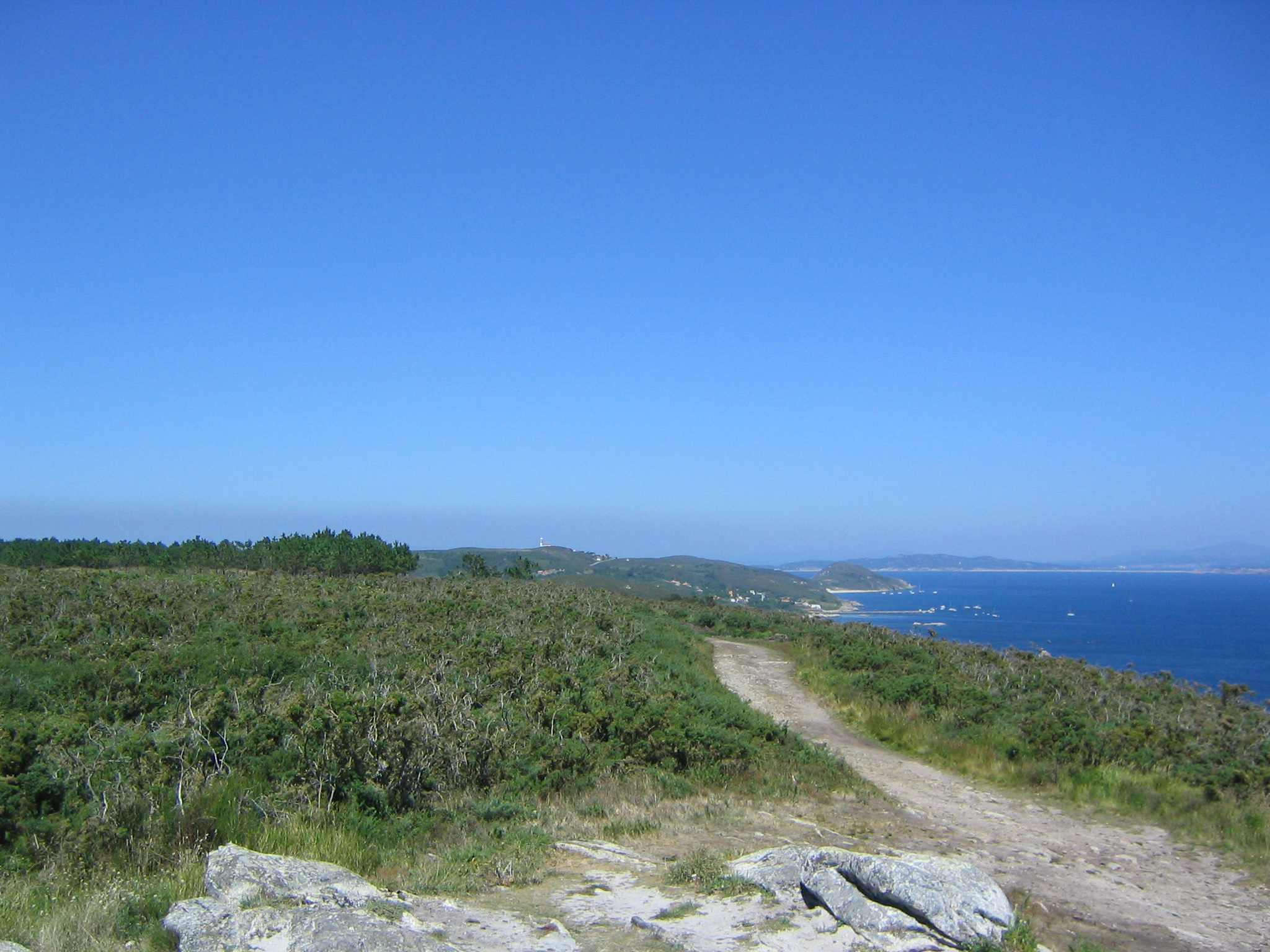 Isla de Ons vista desde Fedorentos. Bueu Pontevedra.